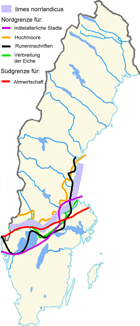 Karte des limes norrlandicus in Schweden